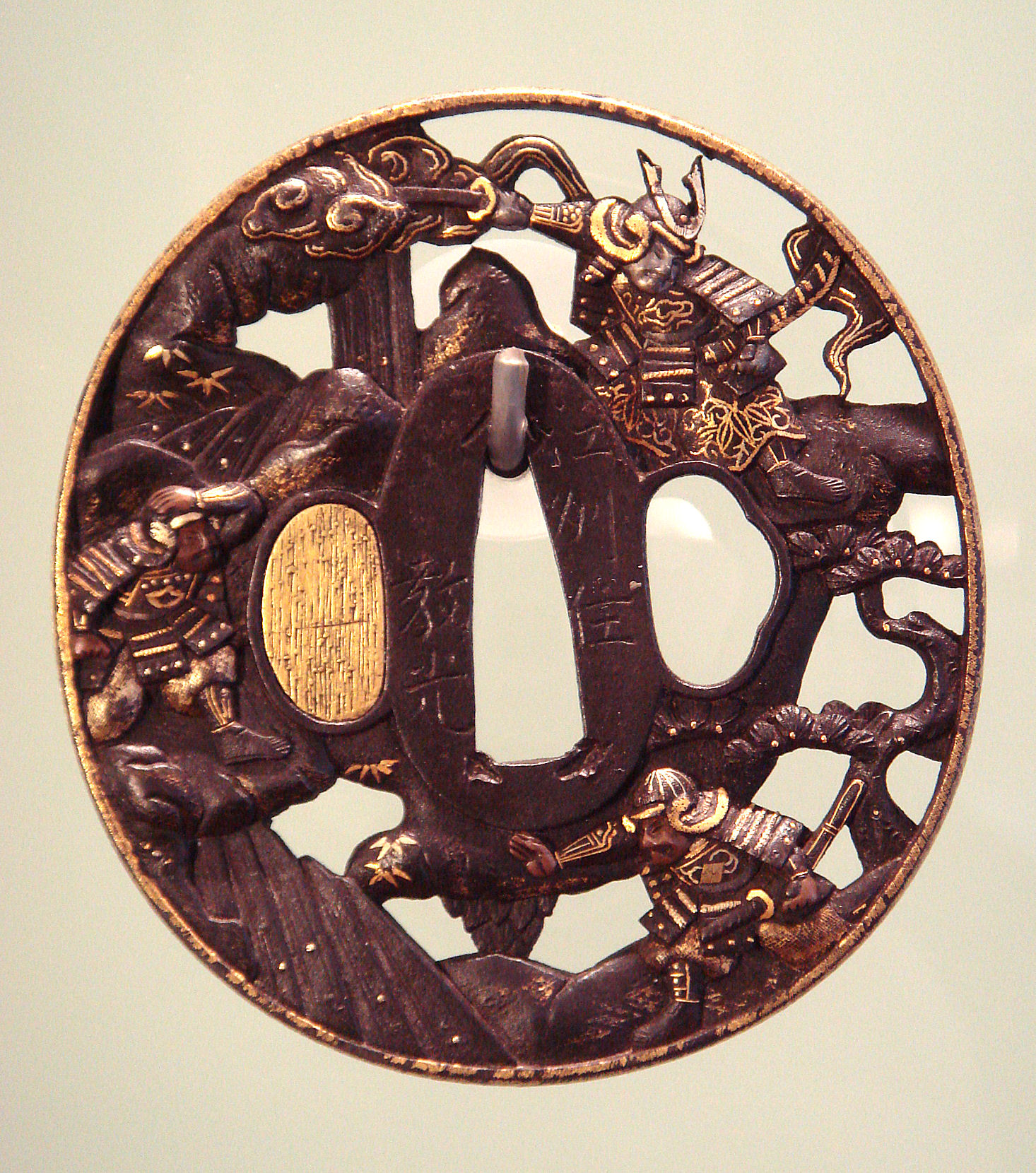 Tsuba (katana sword guard).